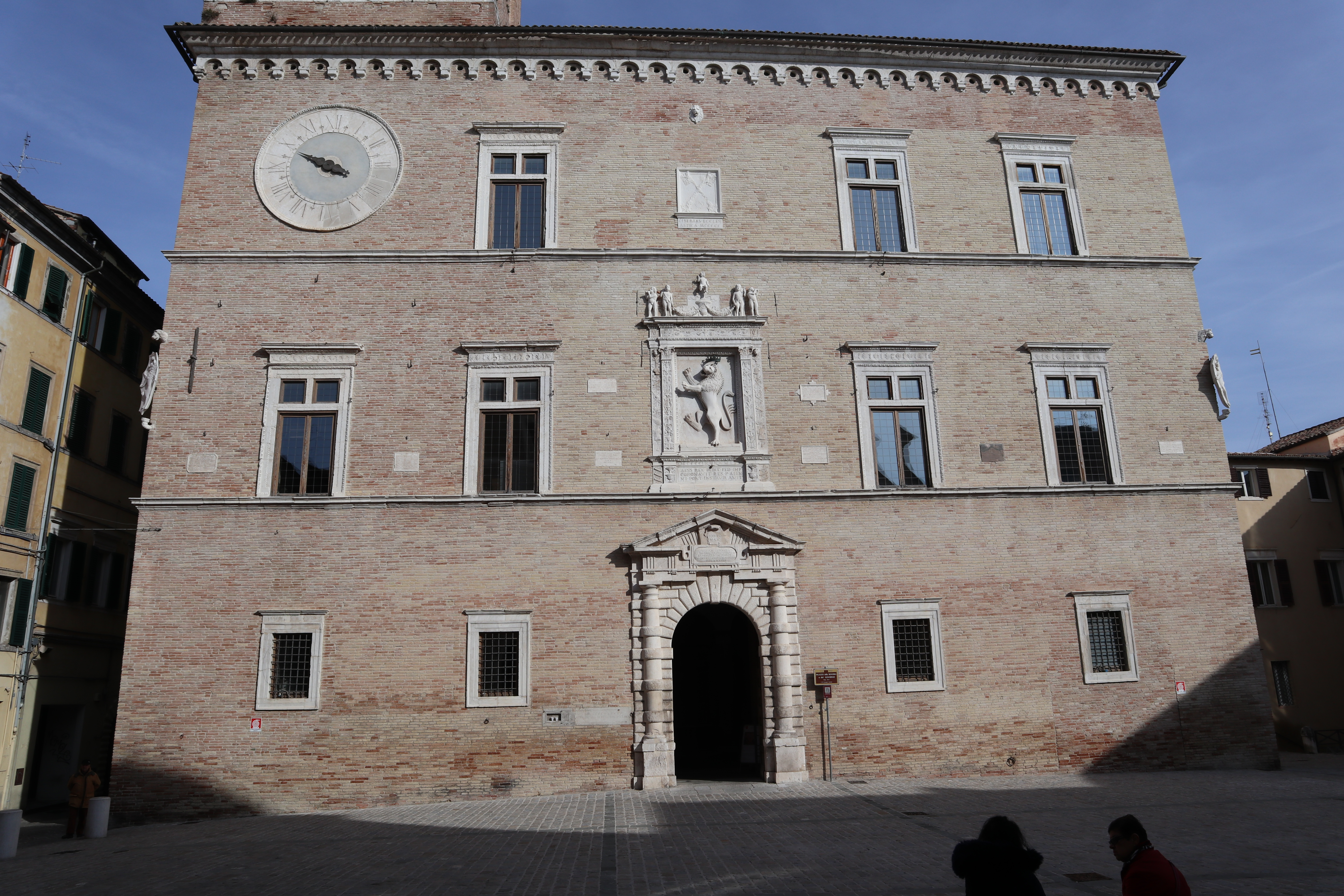 Facciata